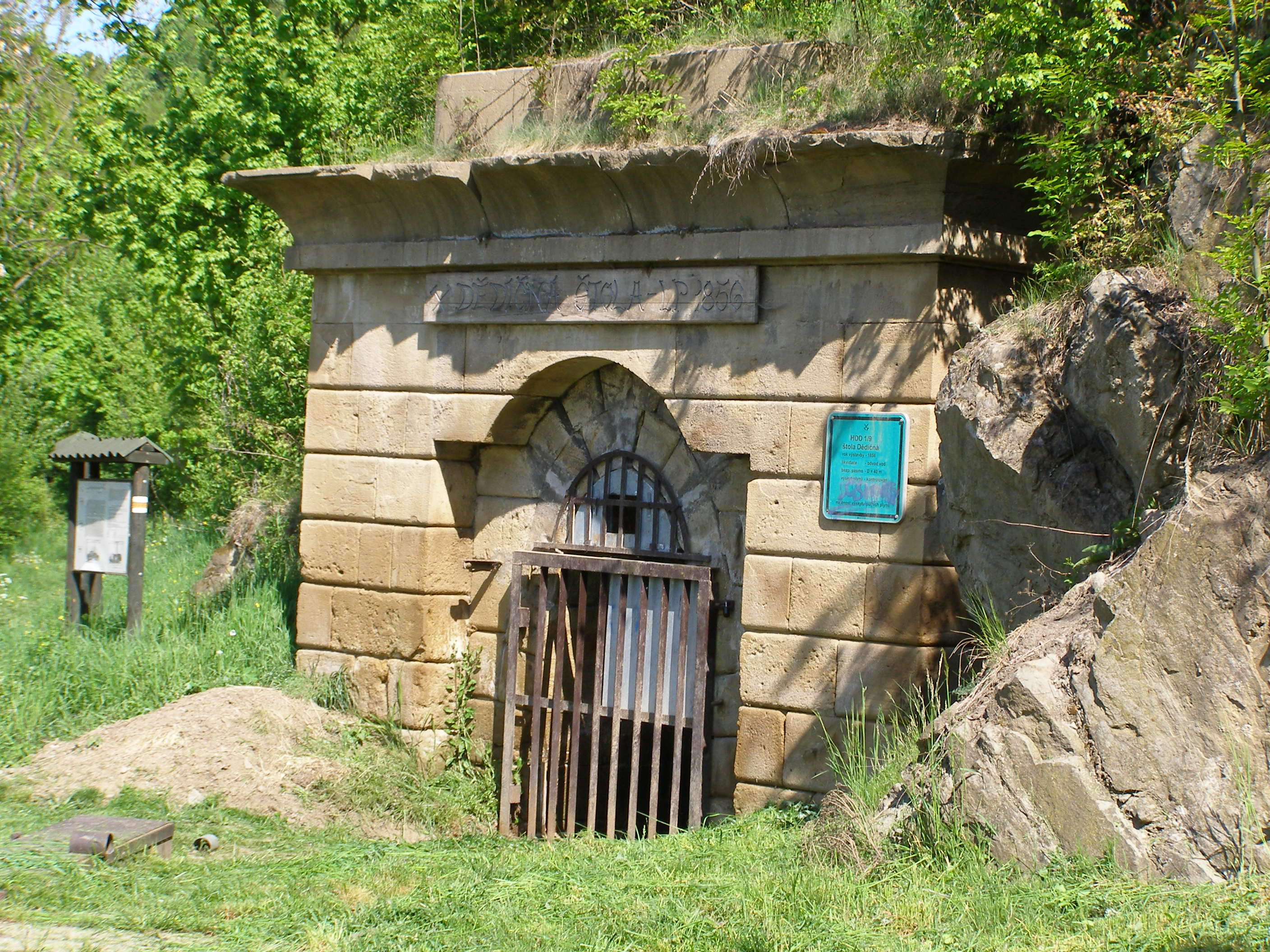 Uhelný důl hlubinný Kukla/V. Nosek, štola Dědičná (Oslavany), Padochovská, Oslavany